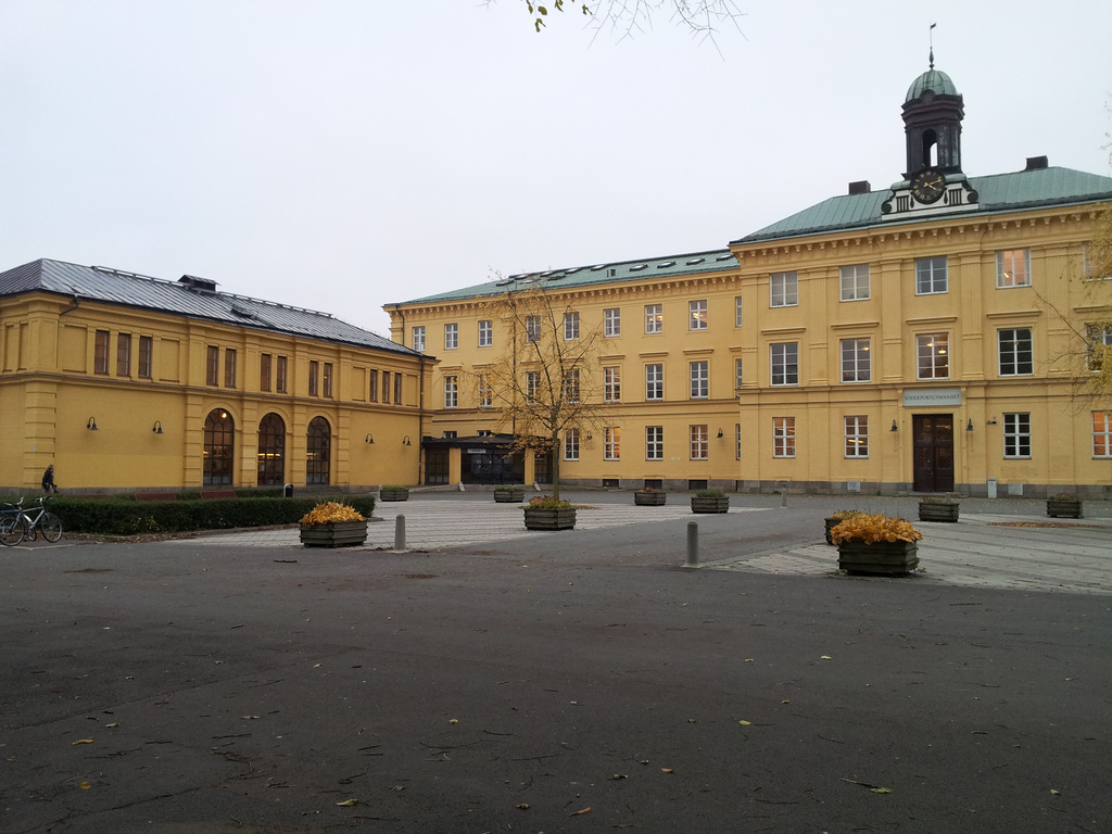 Söderportgymnasiet i Kristianstad. Huvudbyggnad och bibliotek.